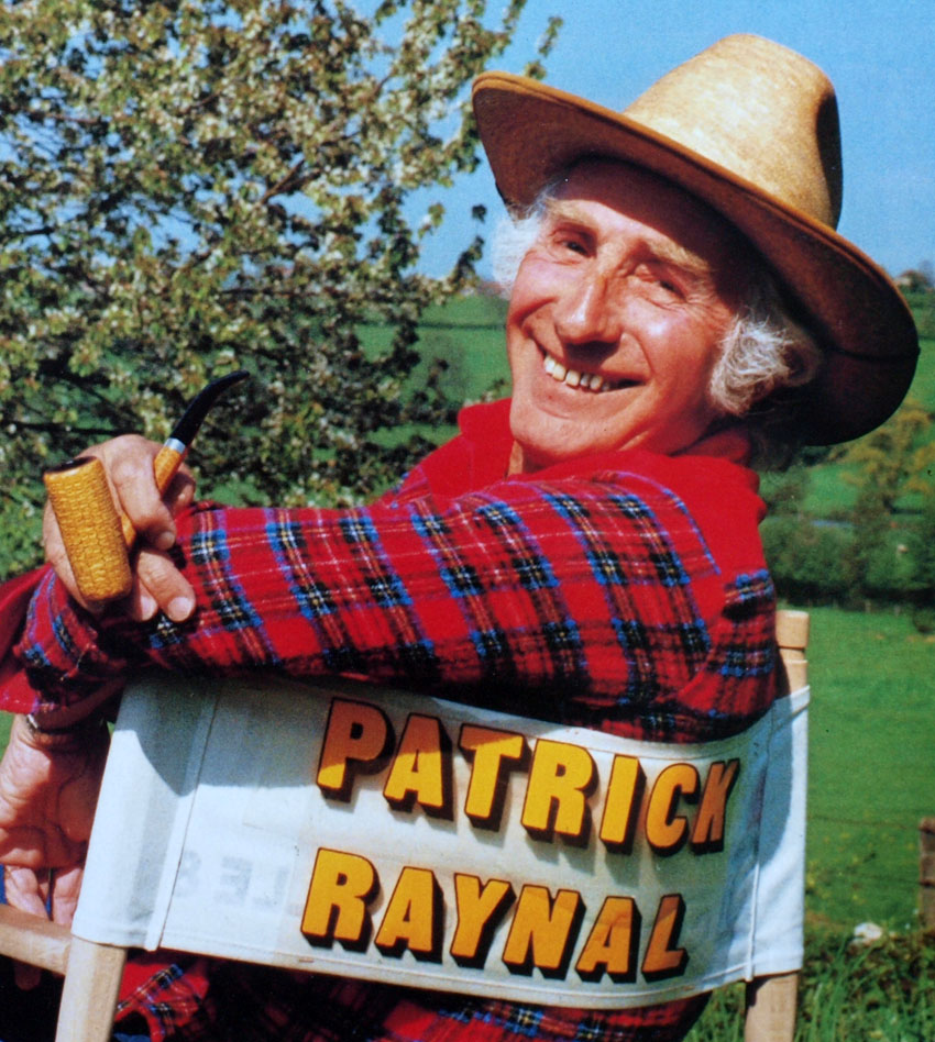 Patrick Raynal sur la pochette du disque La dynastie des Berlodiot